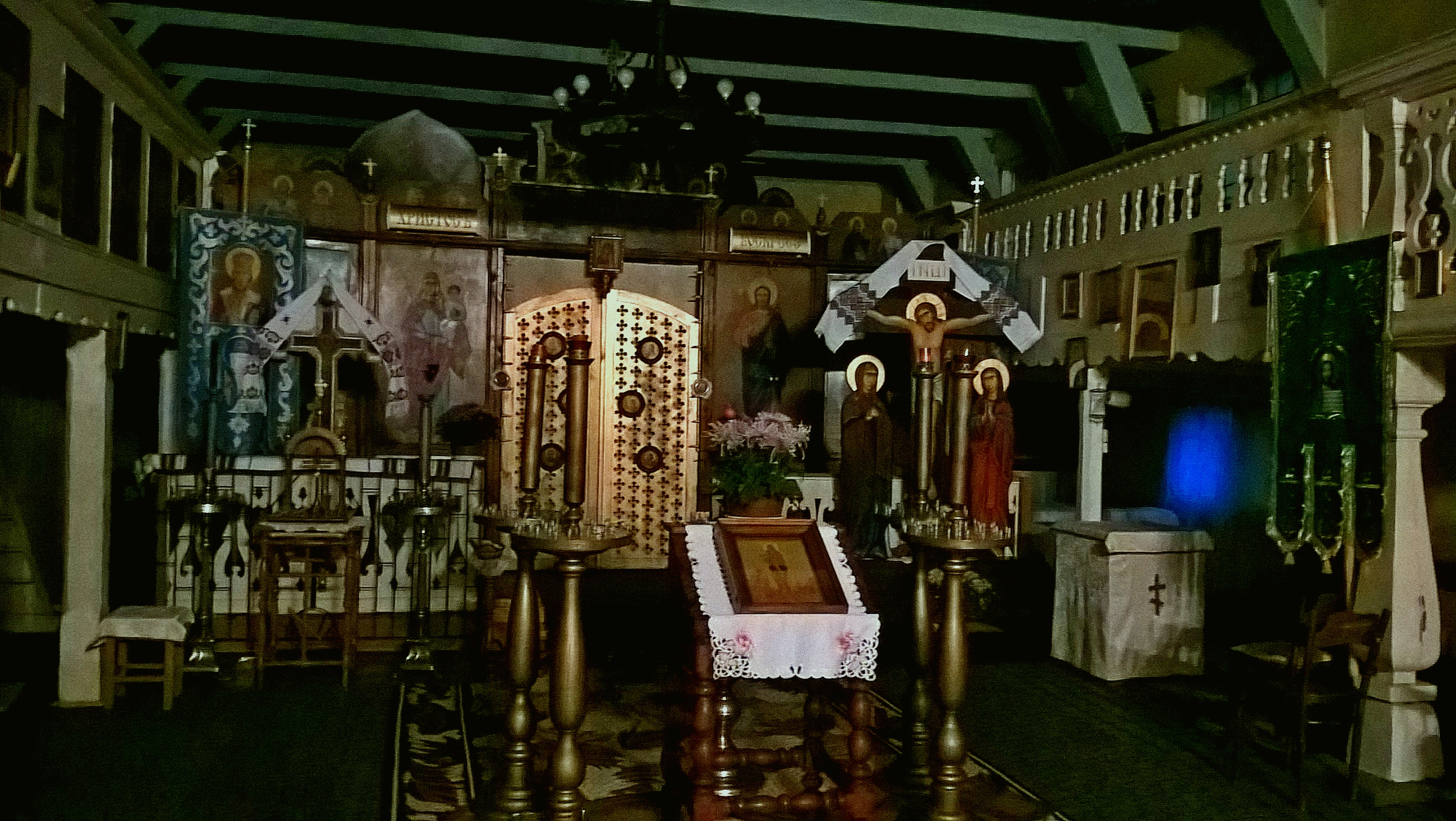 Wnętrze prawosławnej cerkwi św. Onufrego w Pasłęku